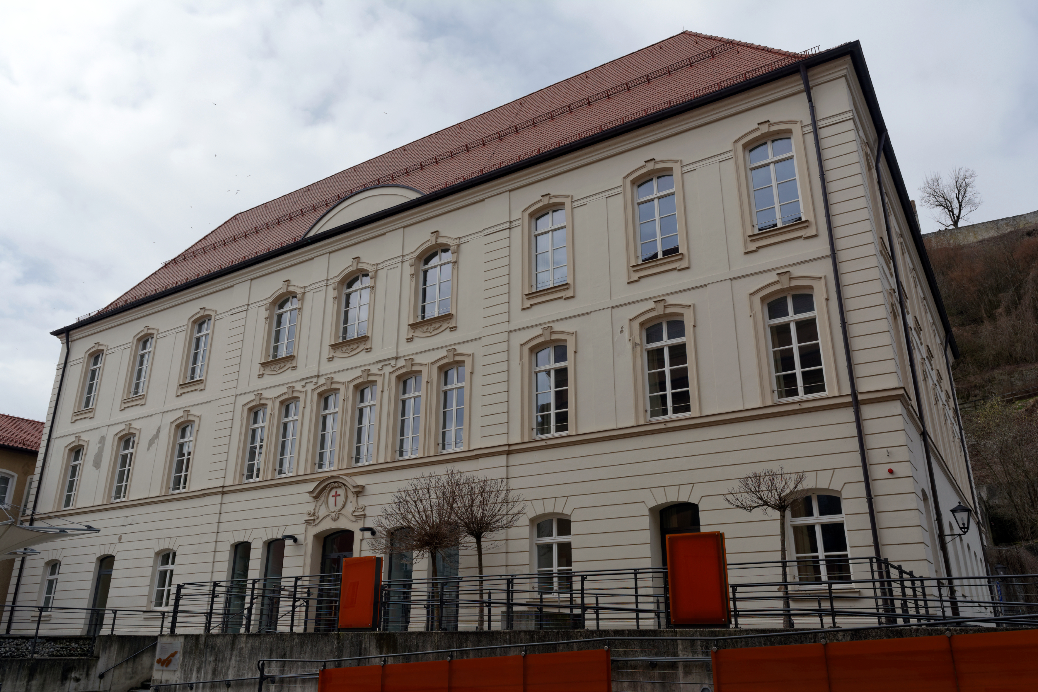 Ehemaliges Salesianer-Seminar